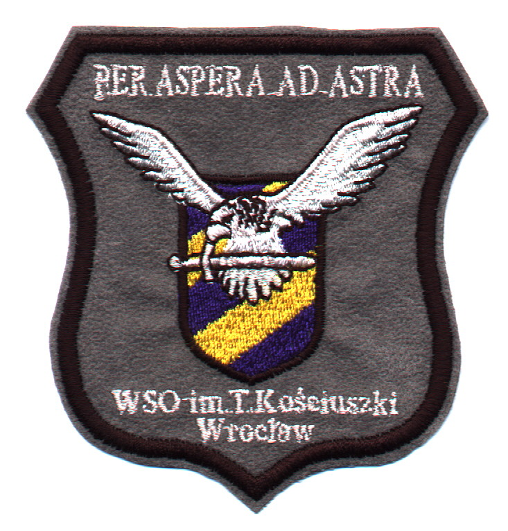 Wyższa Szkoła Oficerska im T. Kościuszki - naszywka